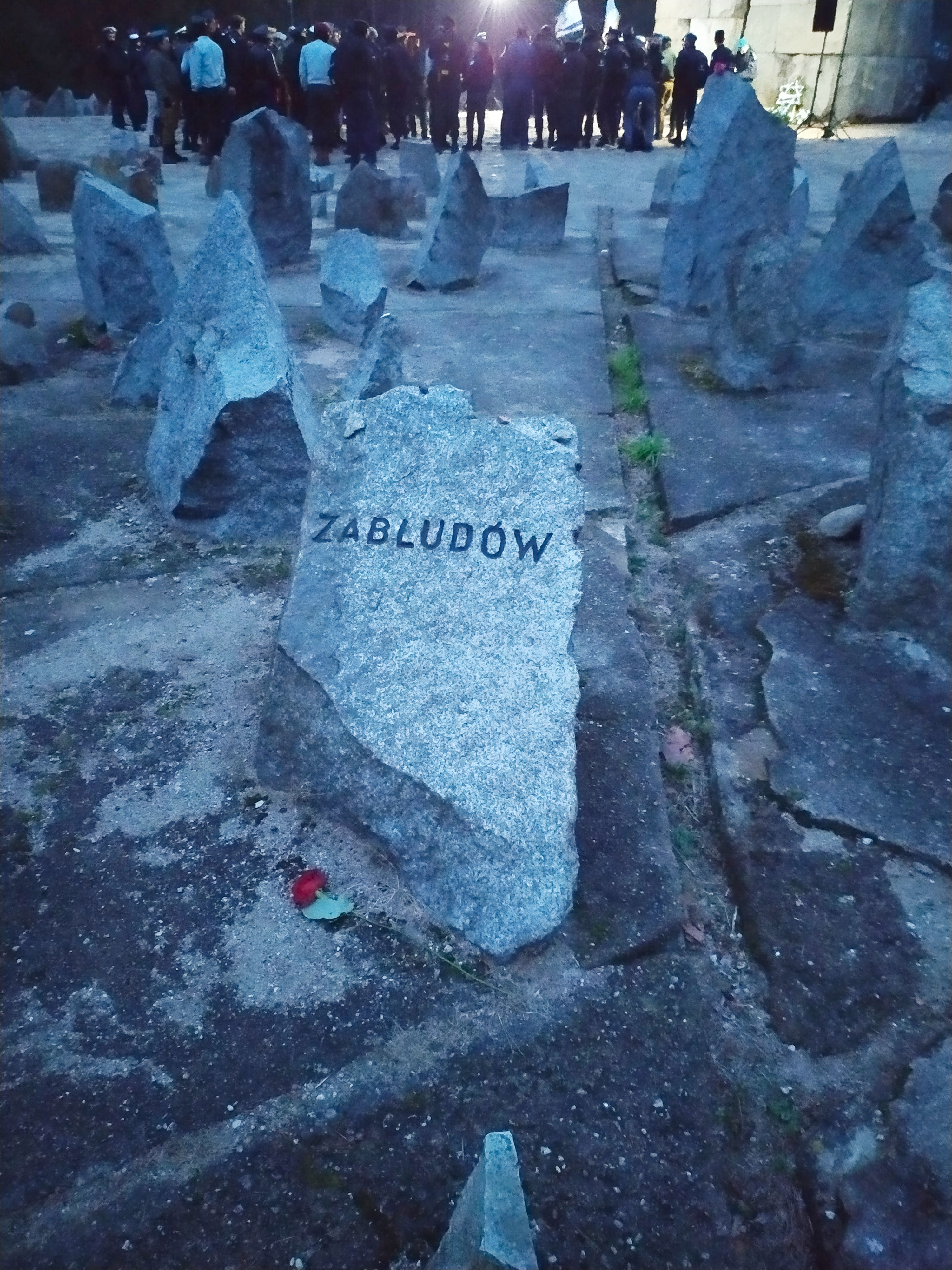 אנדרטת זבלודוו בטרבלינקה